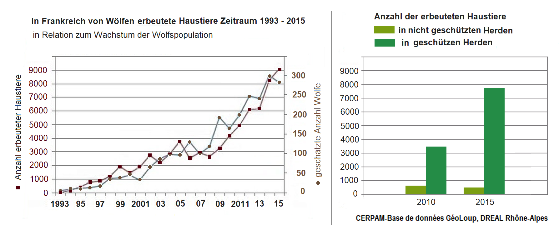 Frankreich: Von Wölfen erbeutete Haustiere, Neuzeichnung, Quellen: [1] [2]